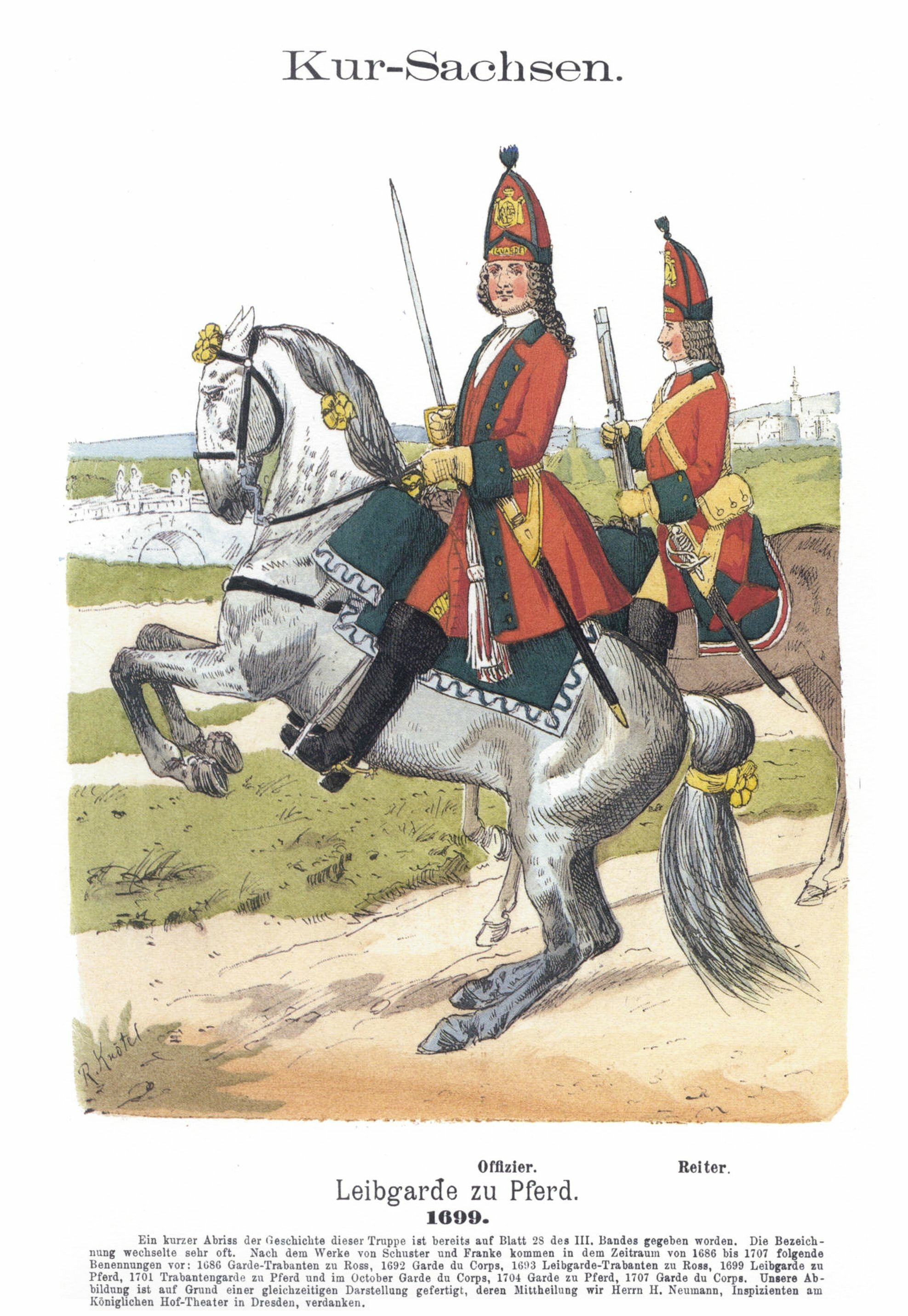 Иллюстрация Рихарда Кнотеля